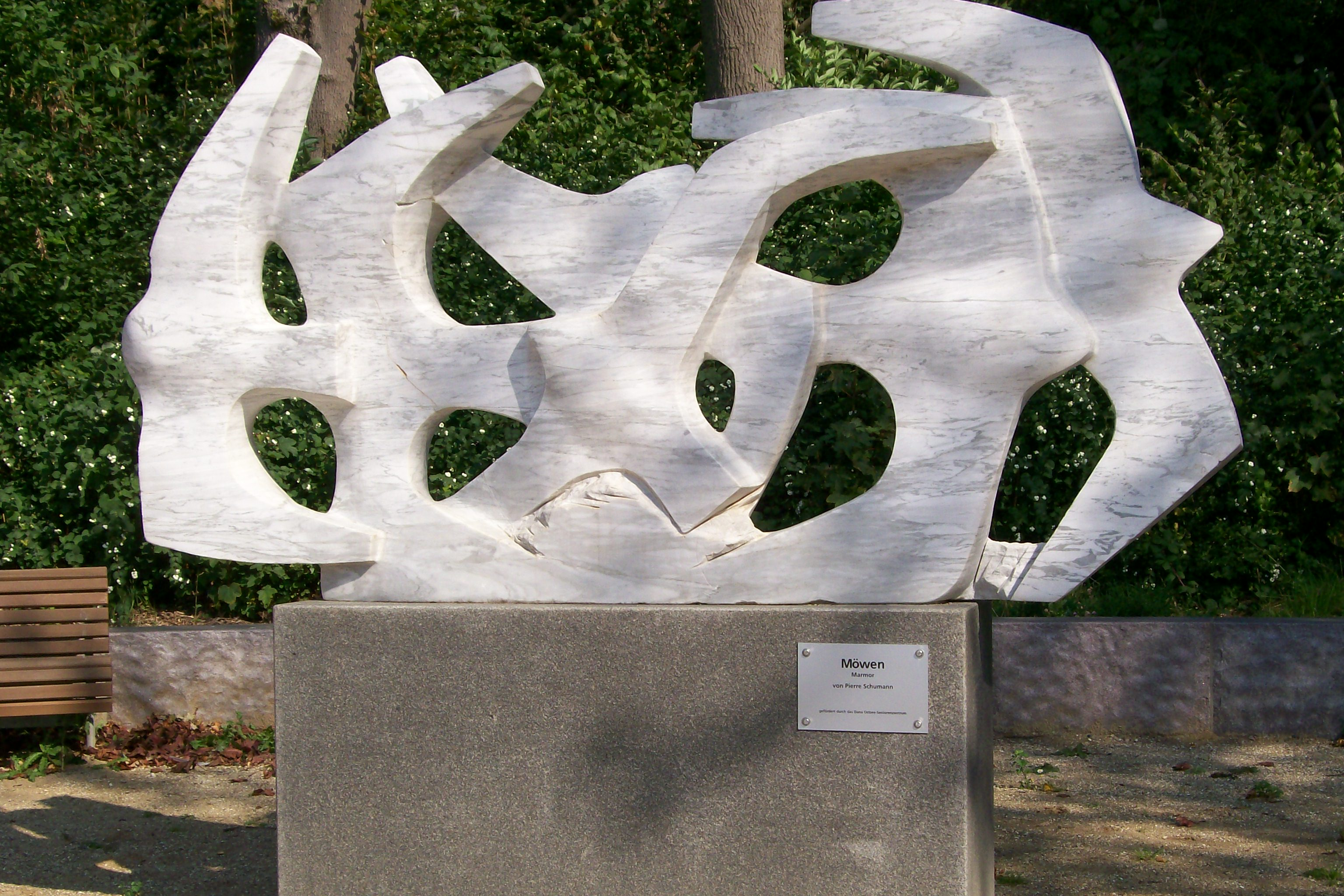 Plastik "Möwen" von Pierre Schumann aus weißem Marmor am Neustädter Hafen in Neustadt in Holstein